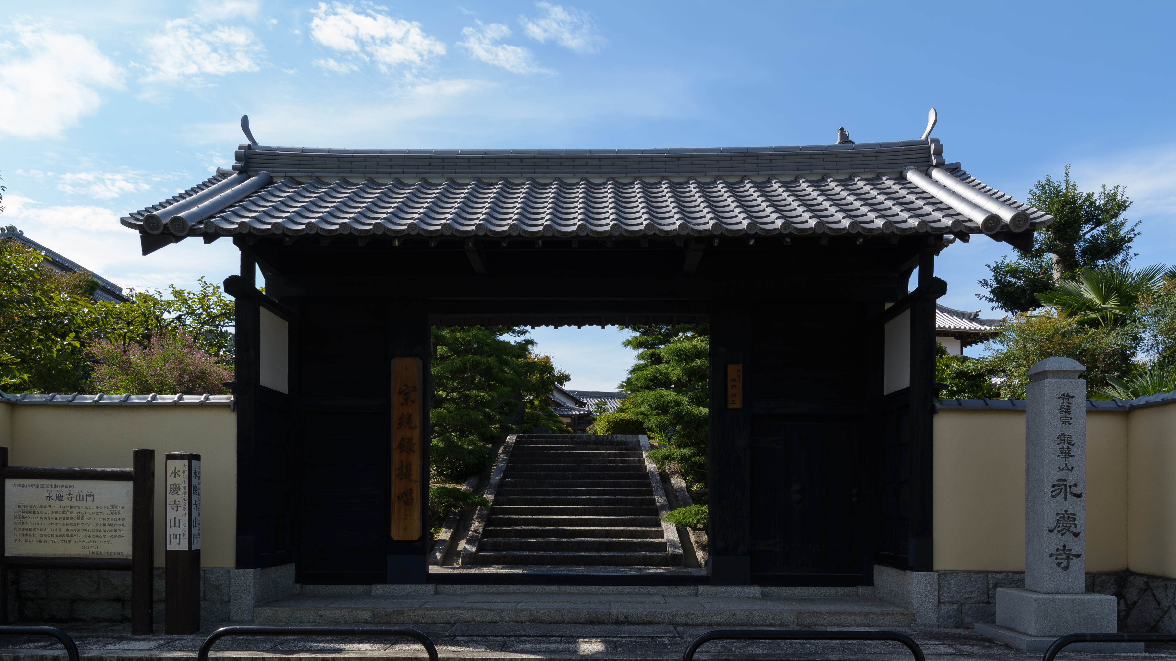 永慶寺山門（奈良県大和郡山市永慶寺町）。大和郡山市教育委員会によれば、山門は豊臣秀長が当地の領主であった頃の郡山城に建築された南御門で、これが幕末期に移築されたもの。寺は享保9年（1724年）創建。